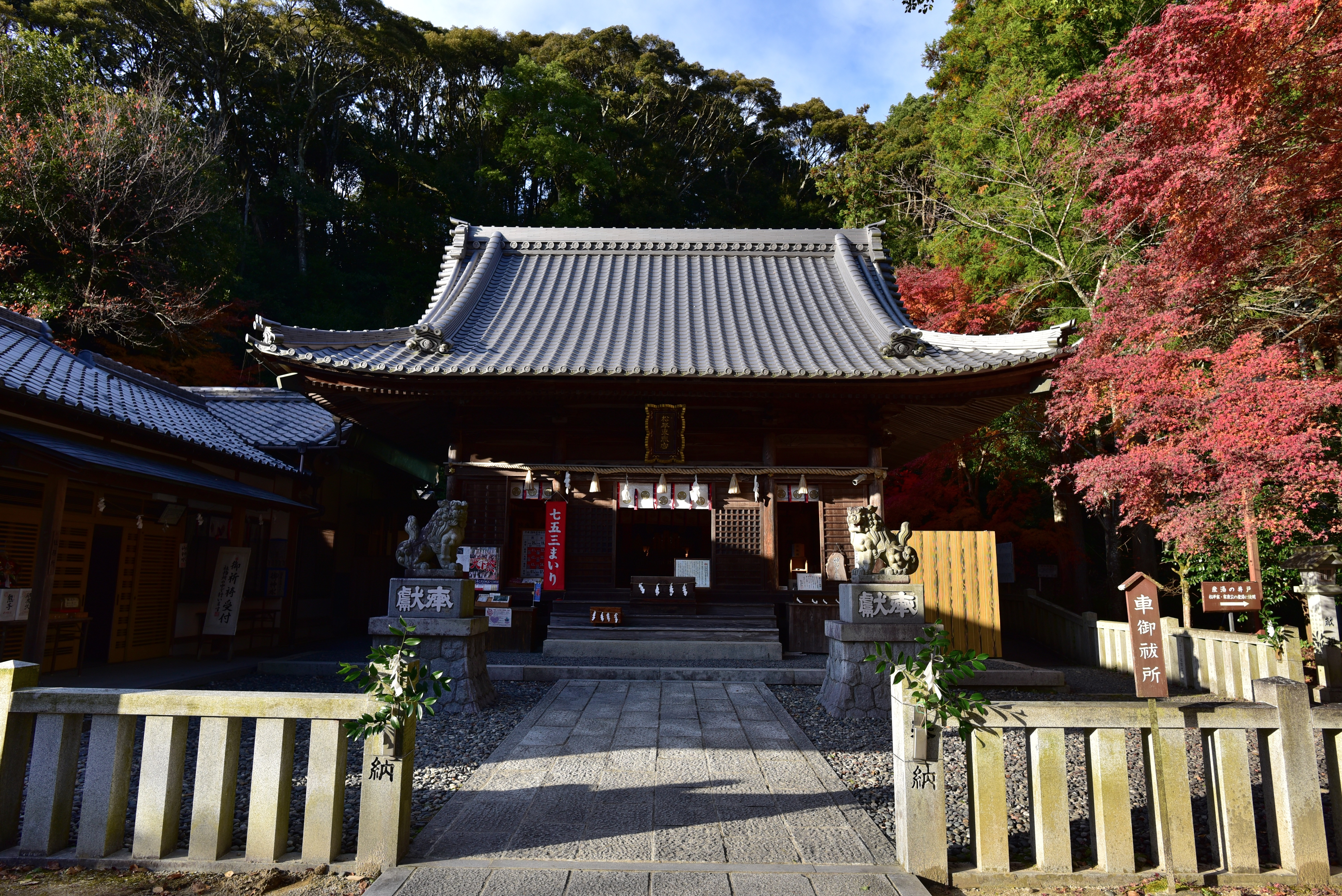 松平東照宮